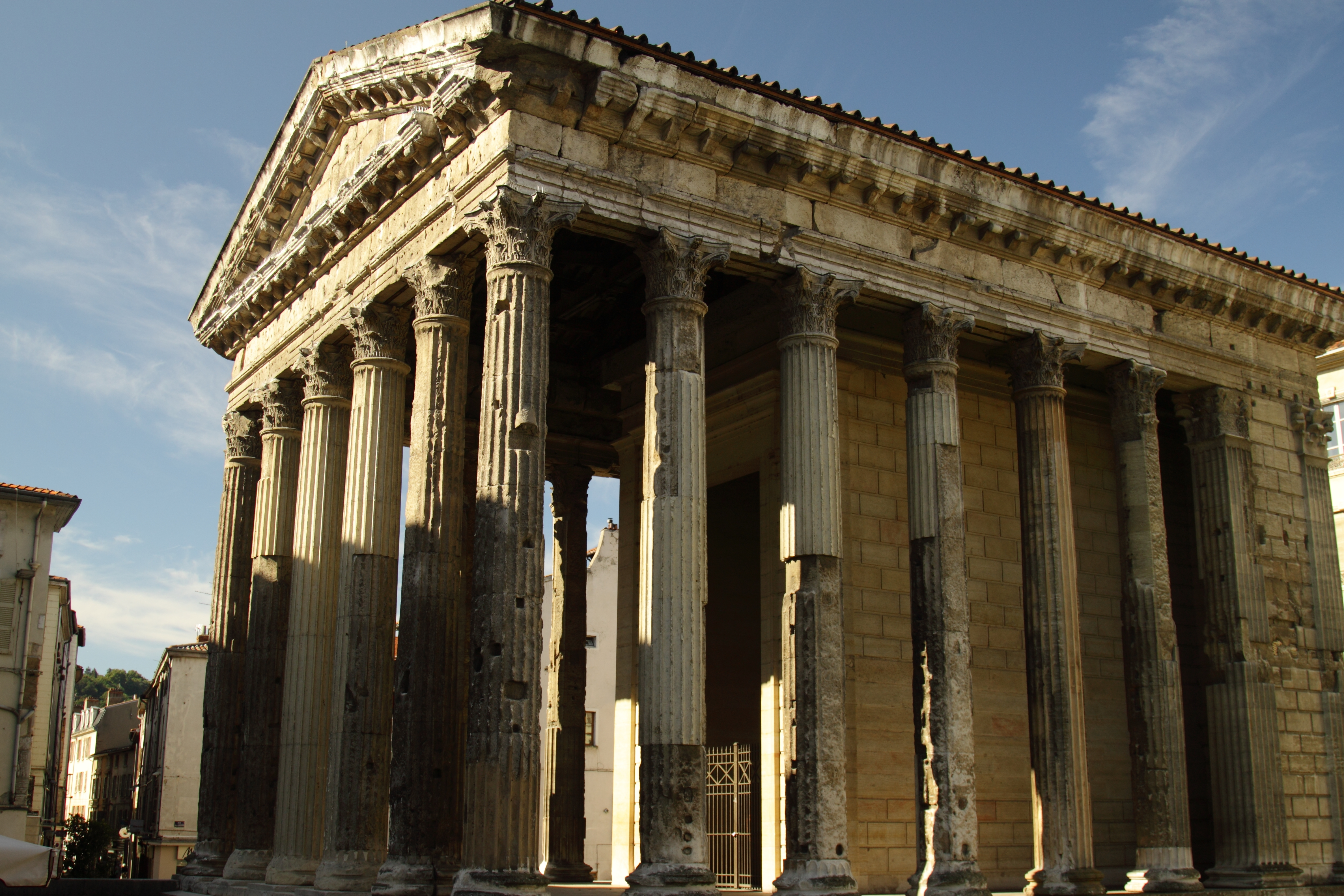 Temple d’Auguste et de Livie .